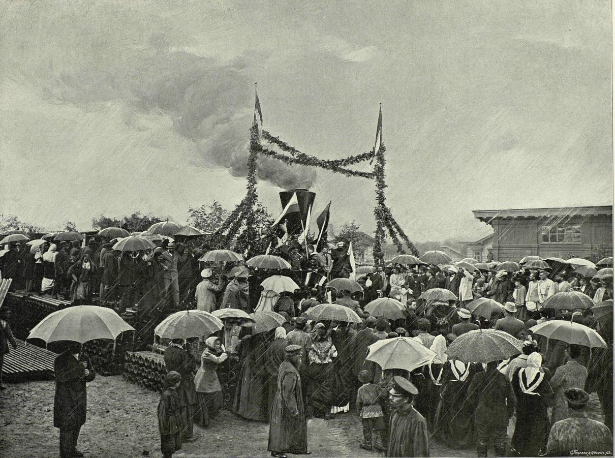 Открытие томской ветки 1 августа 1896 года